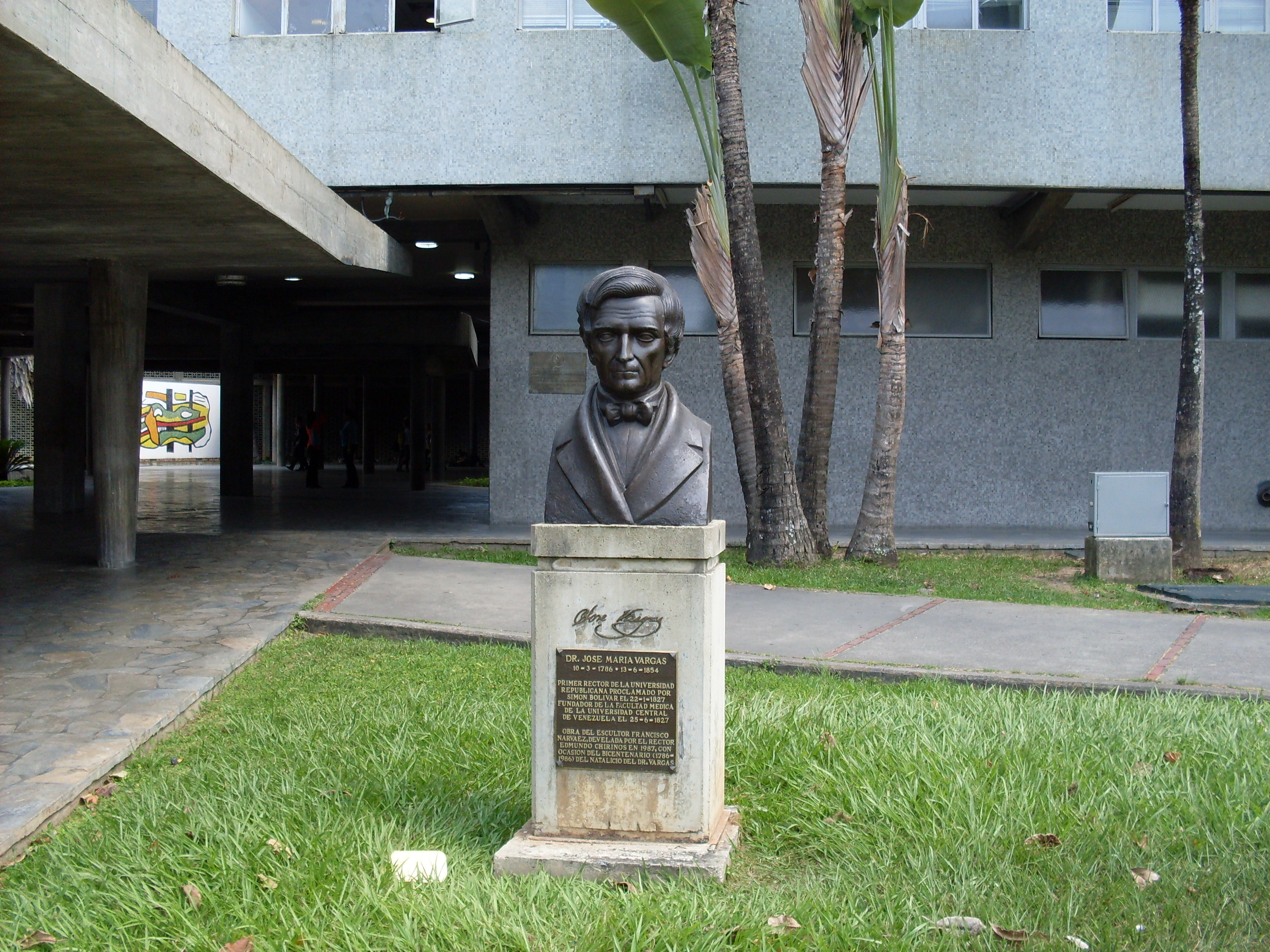 Busto del Dr. José María Vargas. Autor: Francisco Narváez. Año: Ubicación: Universidad Central de Venezuela, Plaza del Rectorado.